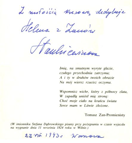 Helena Zan-Stankiewicz's dedication